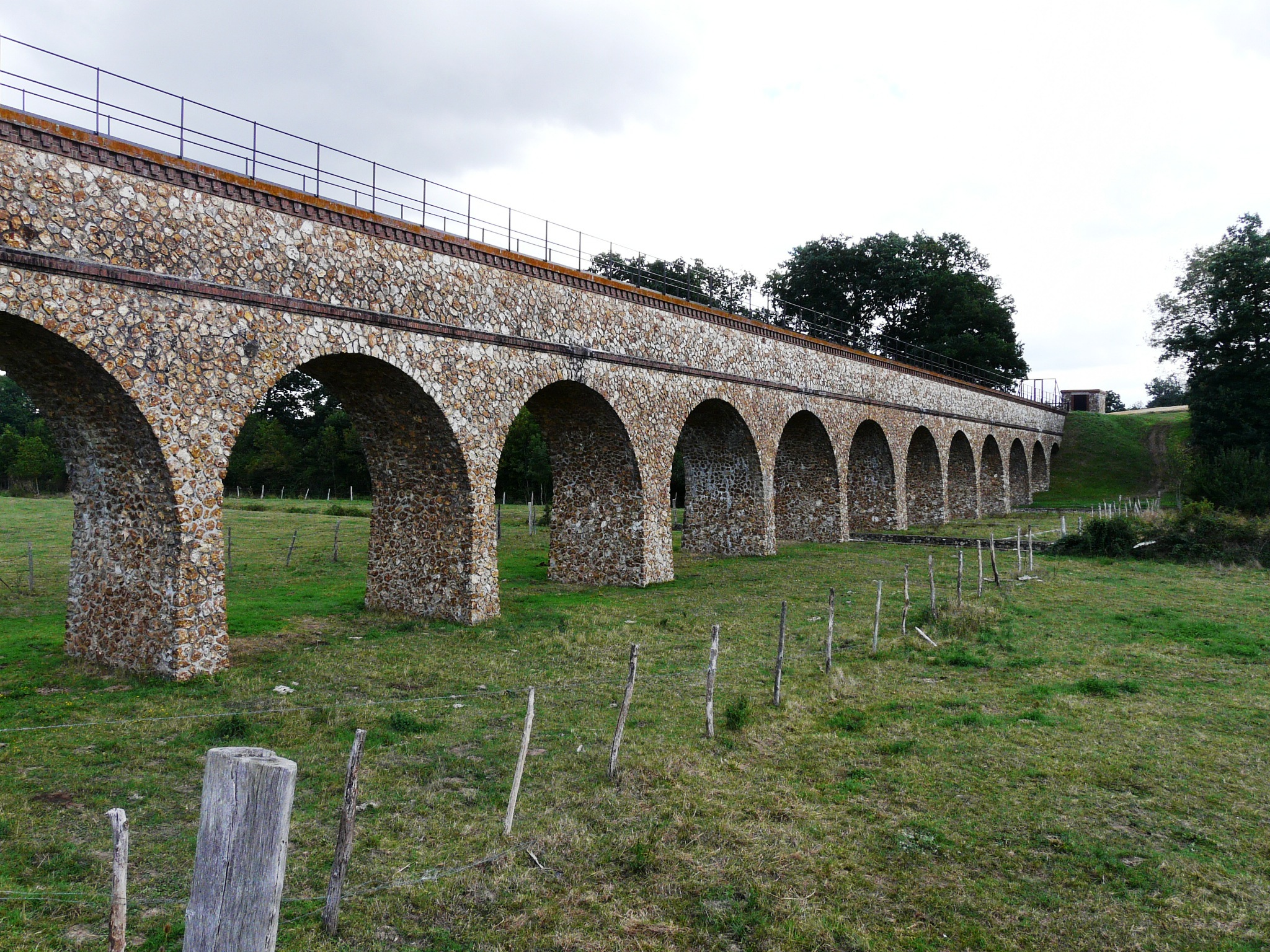 pont aqueduc de l'Avre sur la Meuvette, Revercourt, Eure-et-Loir (France).